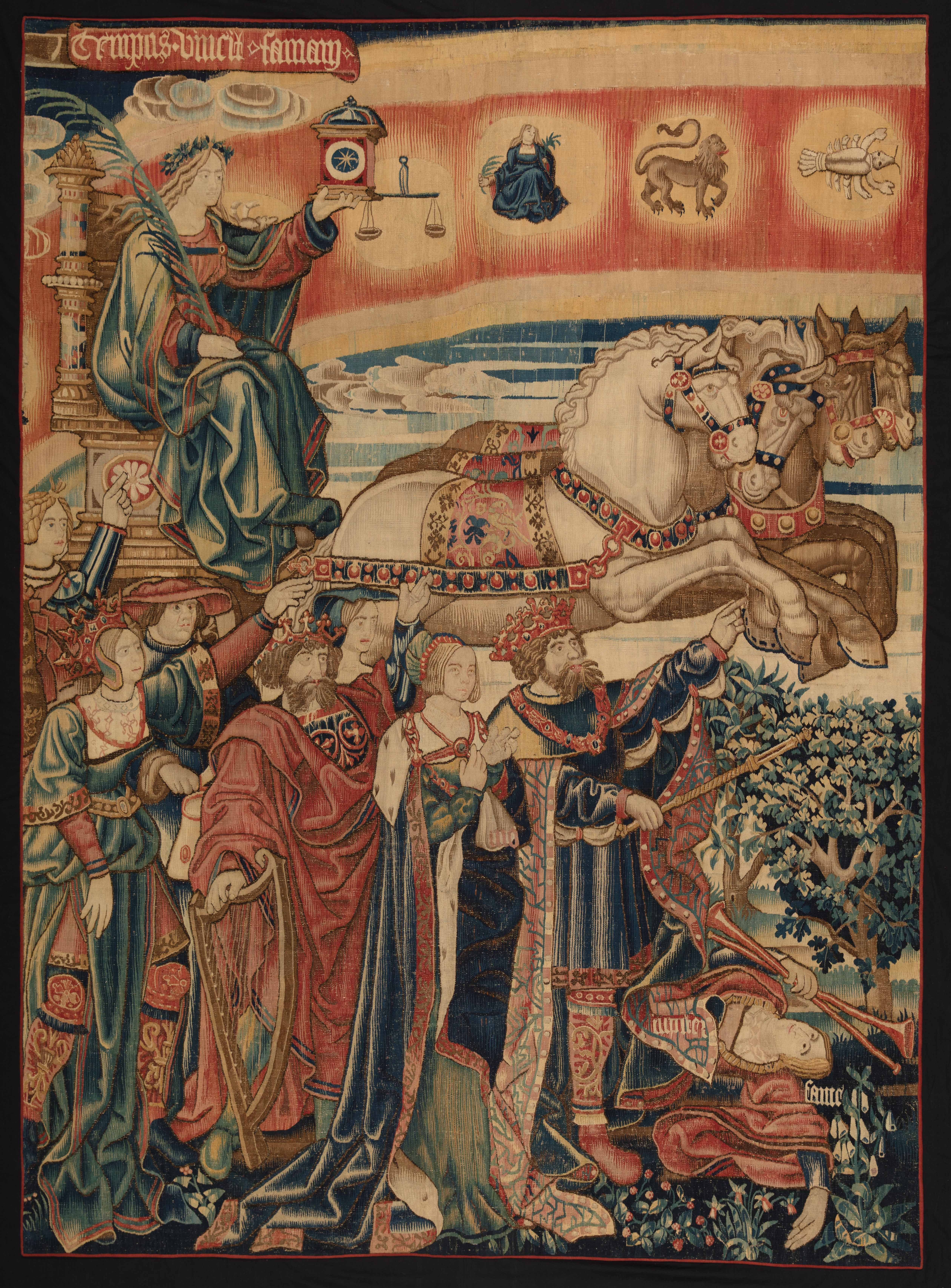 Tapisserie, laine, 336 x 244 cm De Wit Fine Tapestries Malines Photo : Galerie De Wit